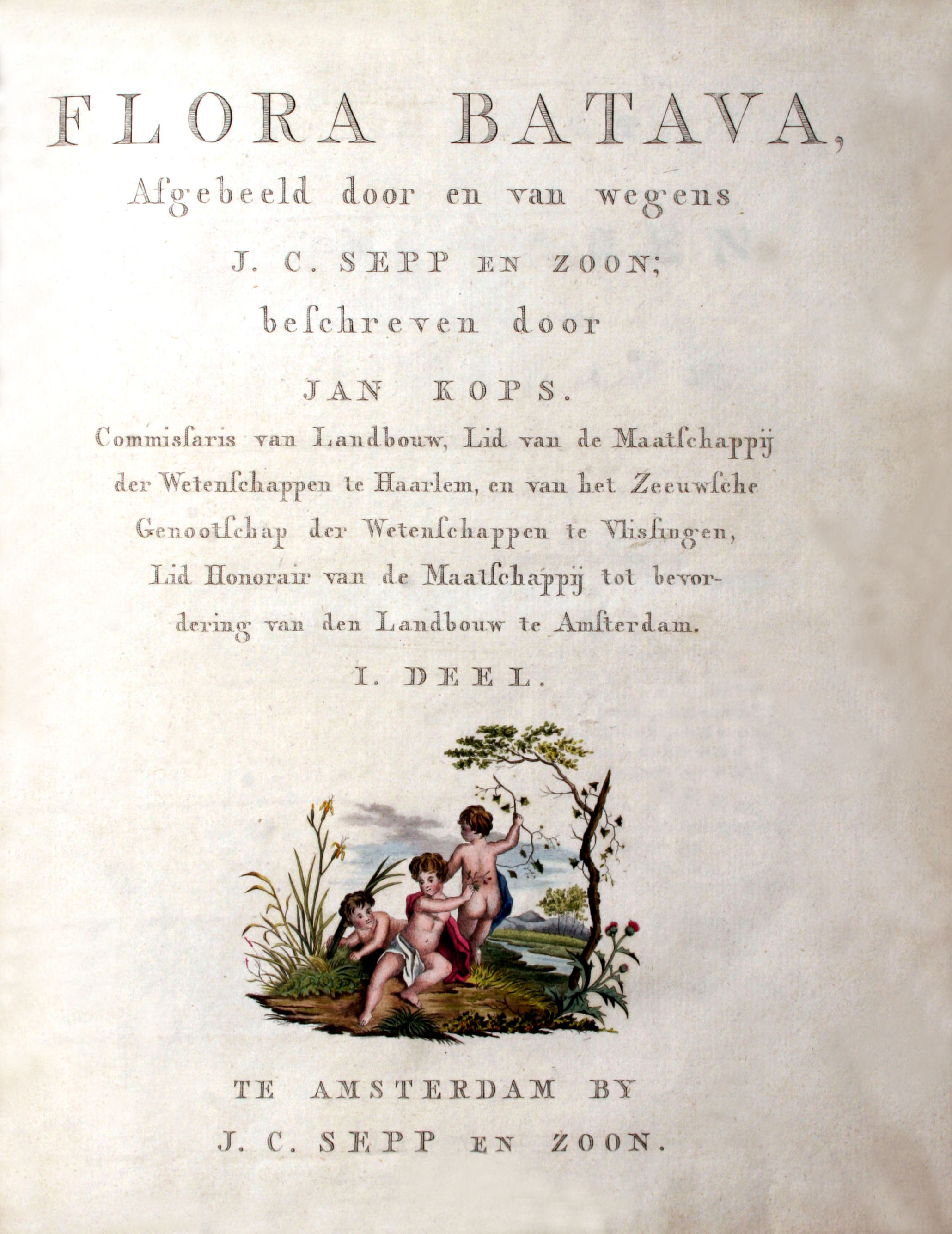 Title